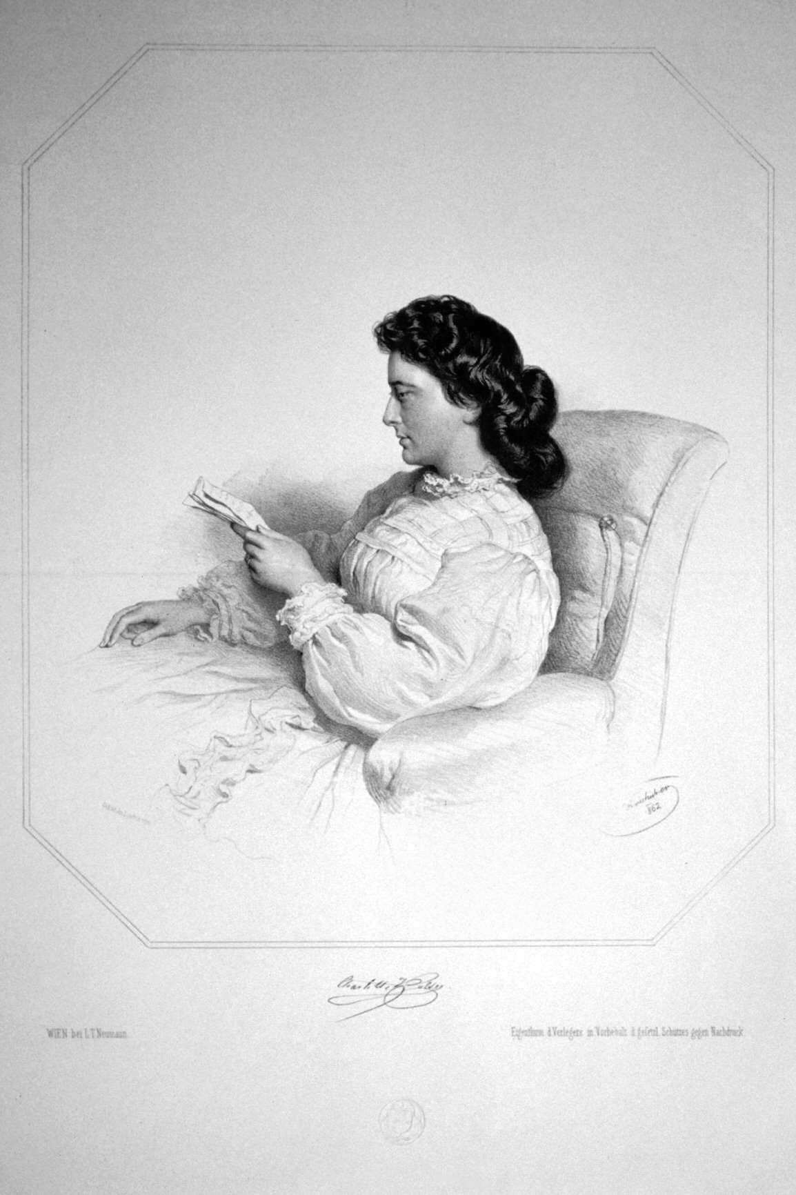 Charlotte Wolter, Lithographie von Josef Kriehuber, 1862